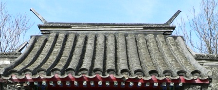 清水脊 拍摄